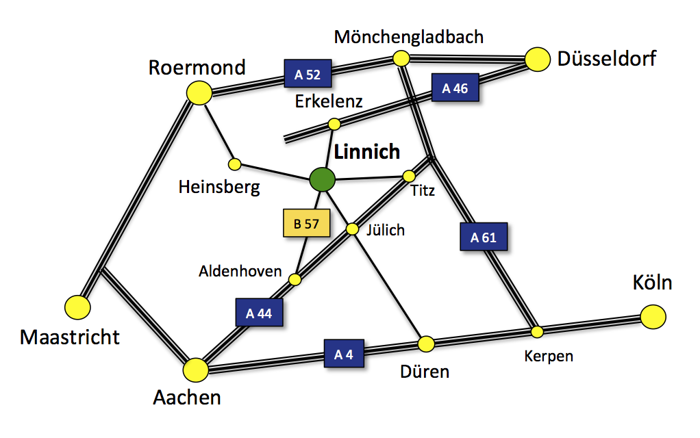 Übersicht über die umliegenden Städte von Linnich und deren Erreichbarkeit